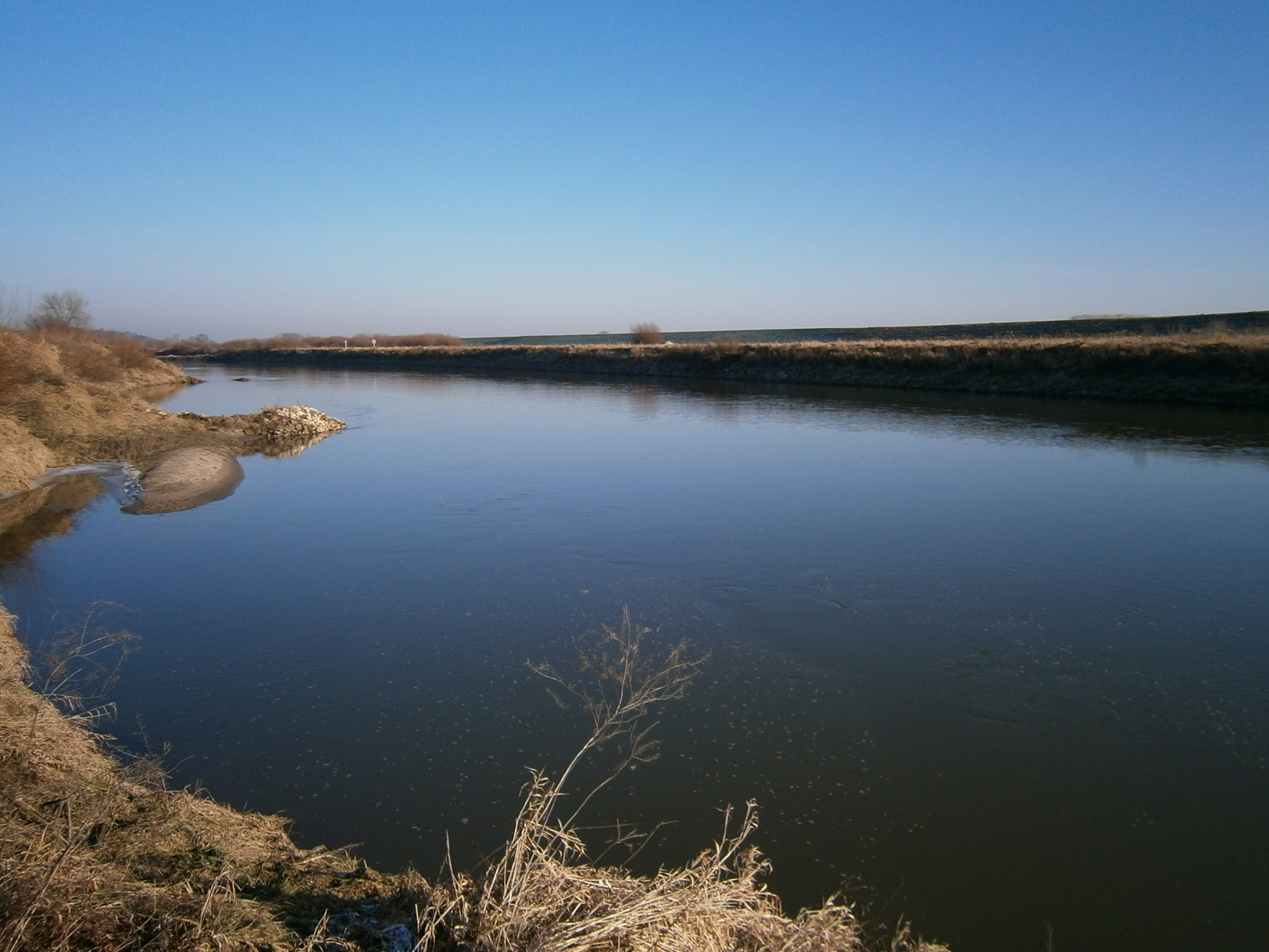 Fragment Wisły. Zdjęcie wykonano na dawnej przystani promowej za Koszycami.